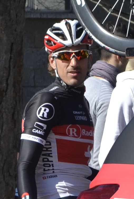 Cancellara in Gaiole